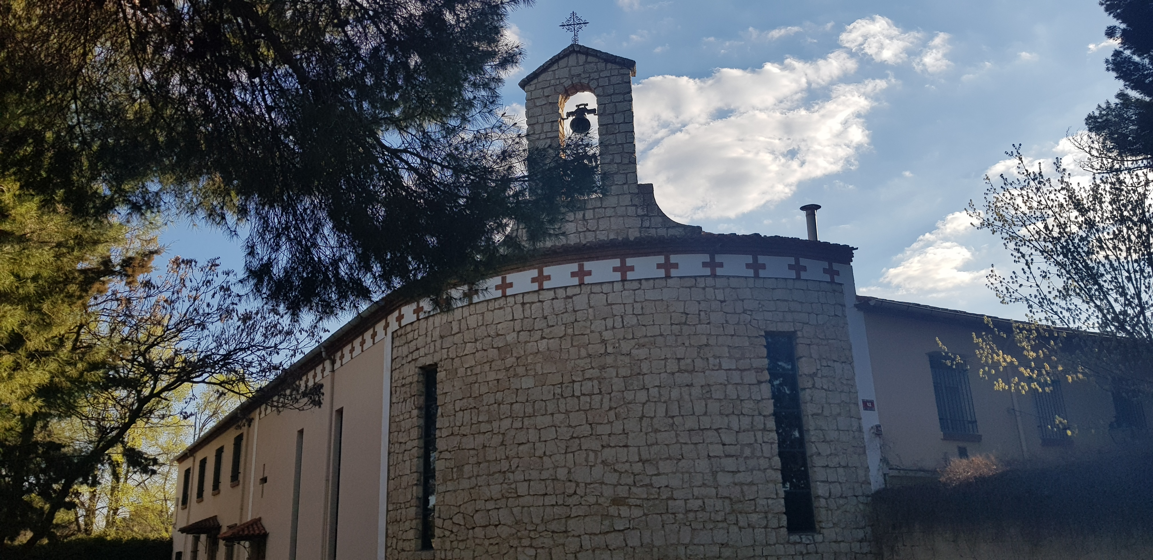 Convento de las Carmelitas Descalzas. Vereda de Jaén. Albacete